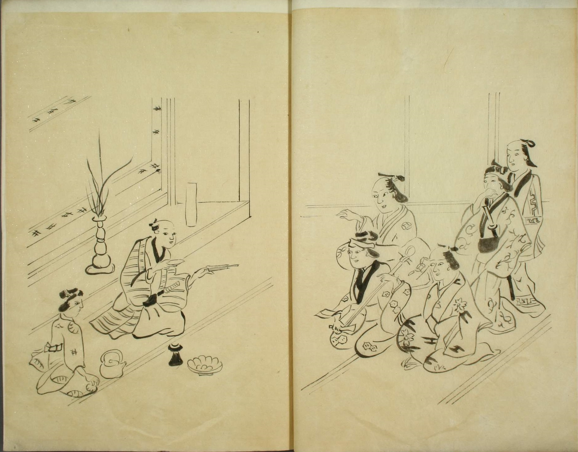 『鹿の巻筆』（しかのまきふで、鹿野武左衛門 作 古山師重 画、 17世紀）より酒宴で噺をする鹿野武左衛門